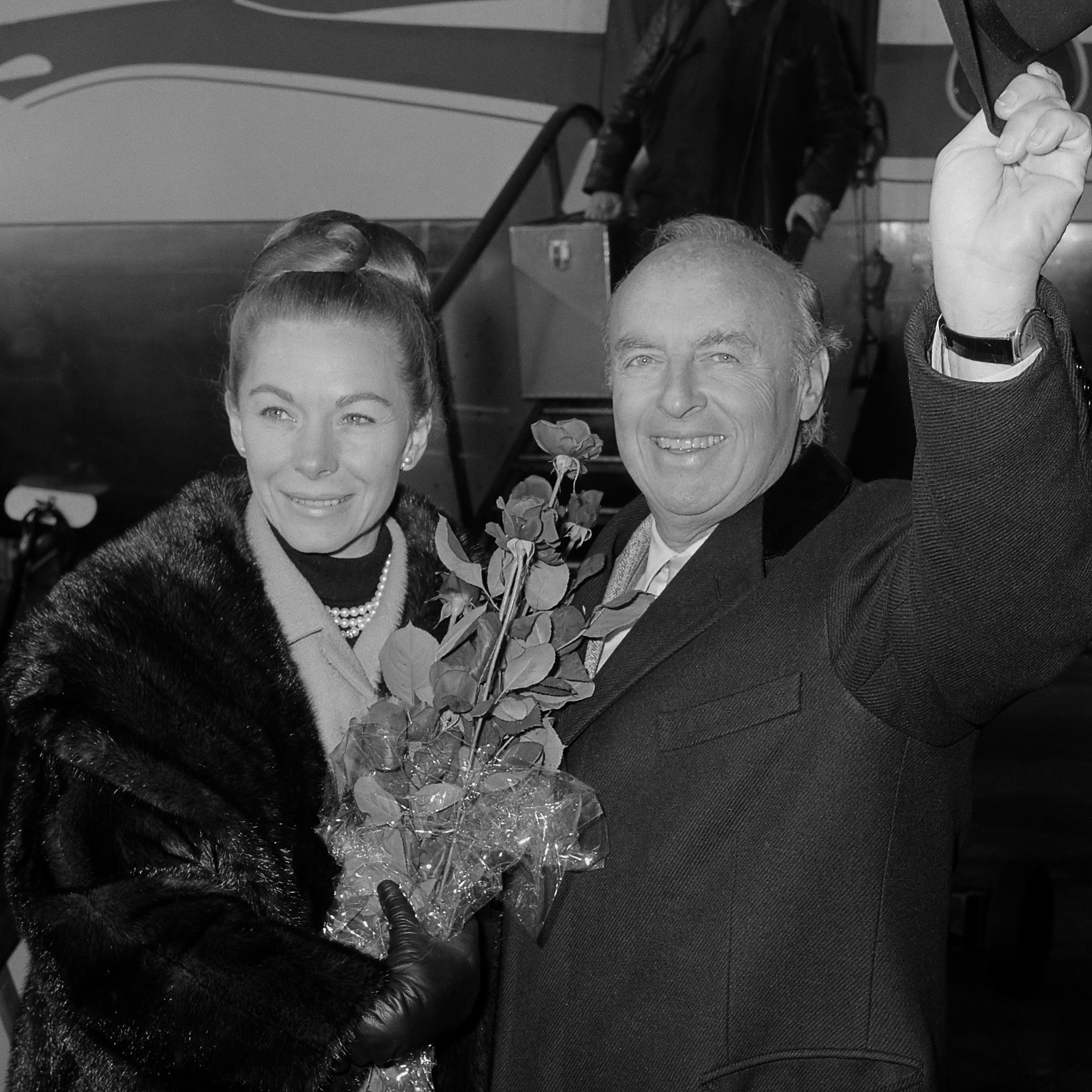 Andre Kostelanetz met echtgenote Sara Gene Orcutt op Schiphol. Andre Kostelanetz 6 december 1963